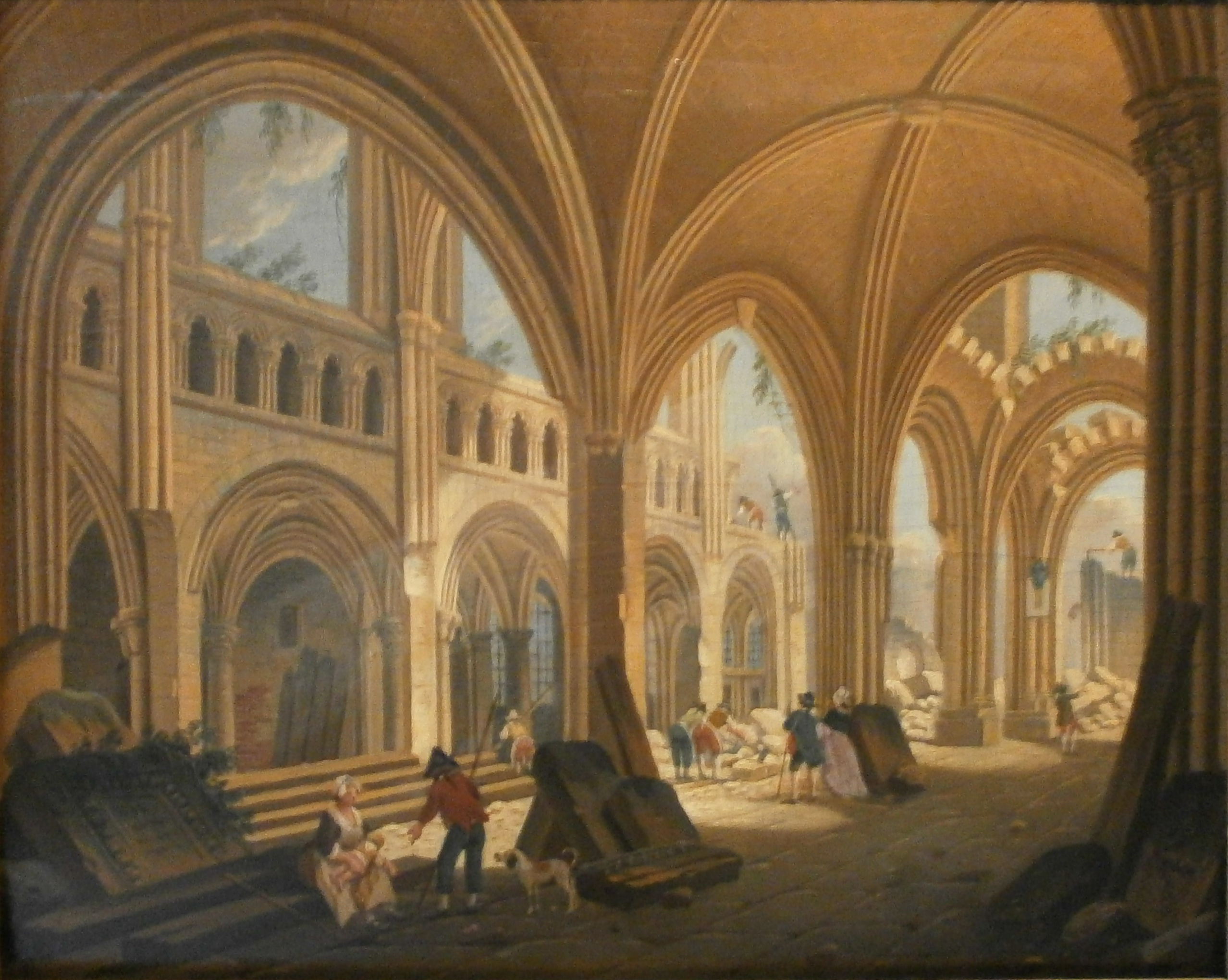 Démolition de l'église Saint-Jean-en-Grève Achat